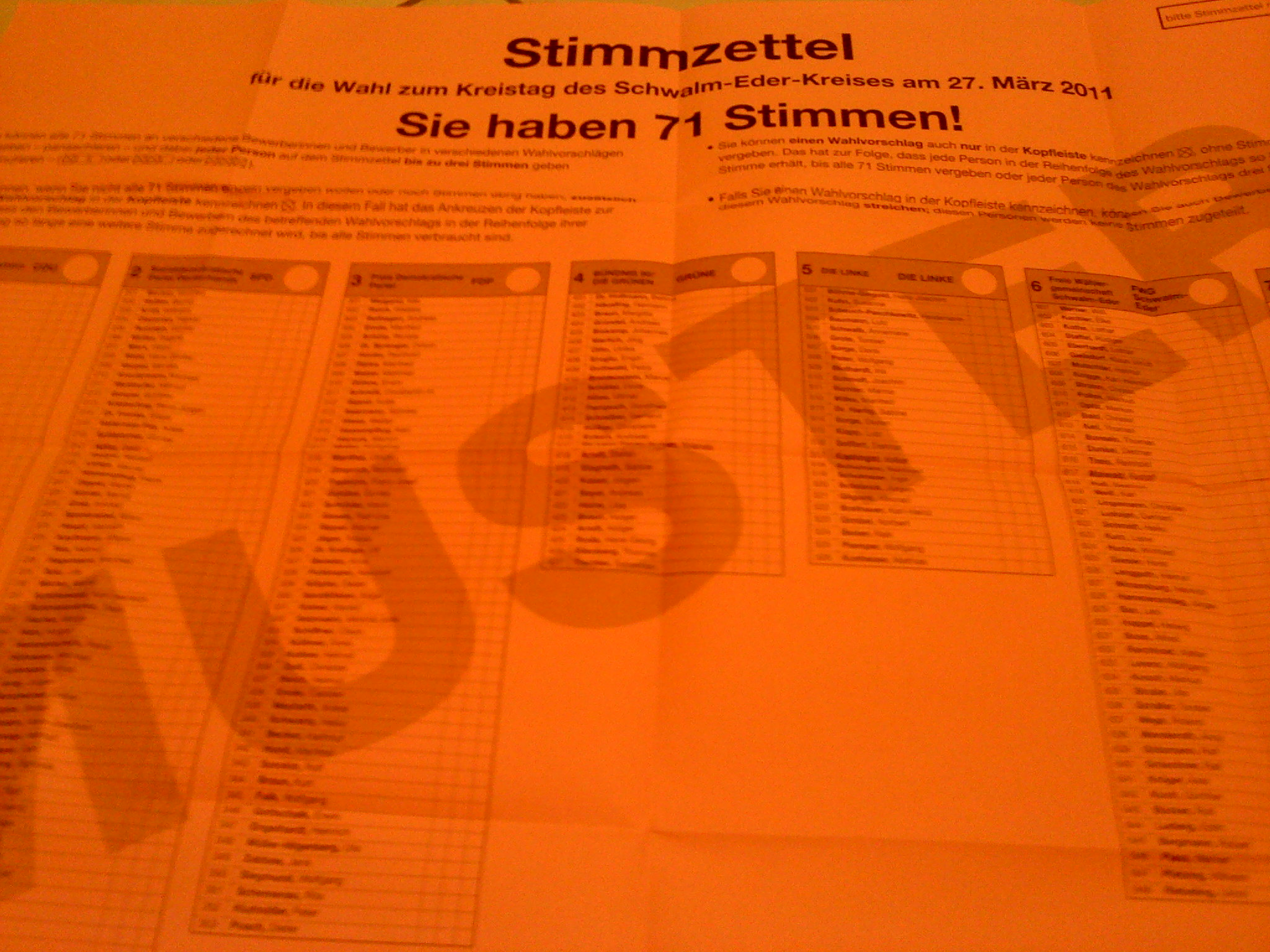 Musterstimmzettel zur Wahl des Kreistages des Schwalm-Eder-Kreises am 27. März 2011